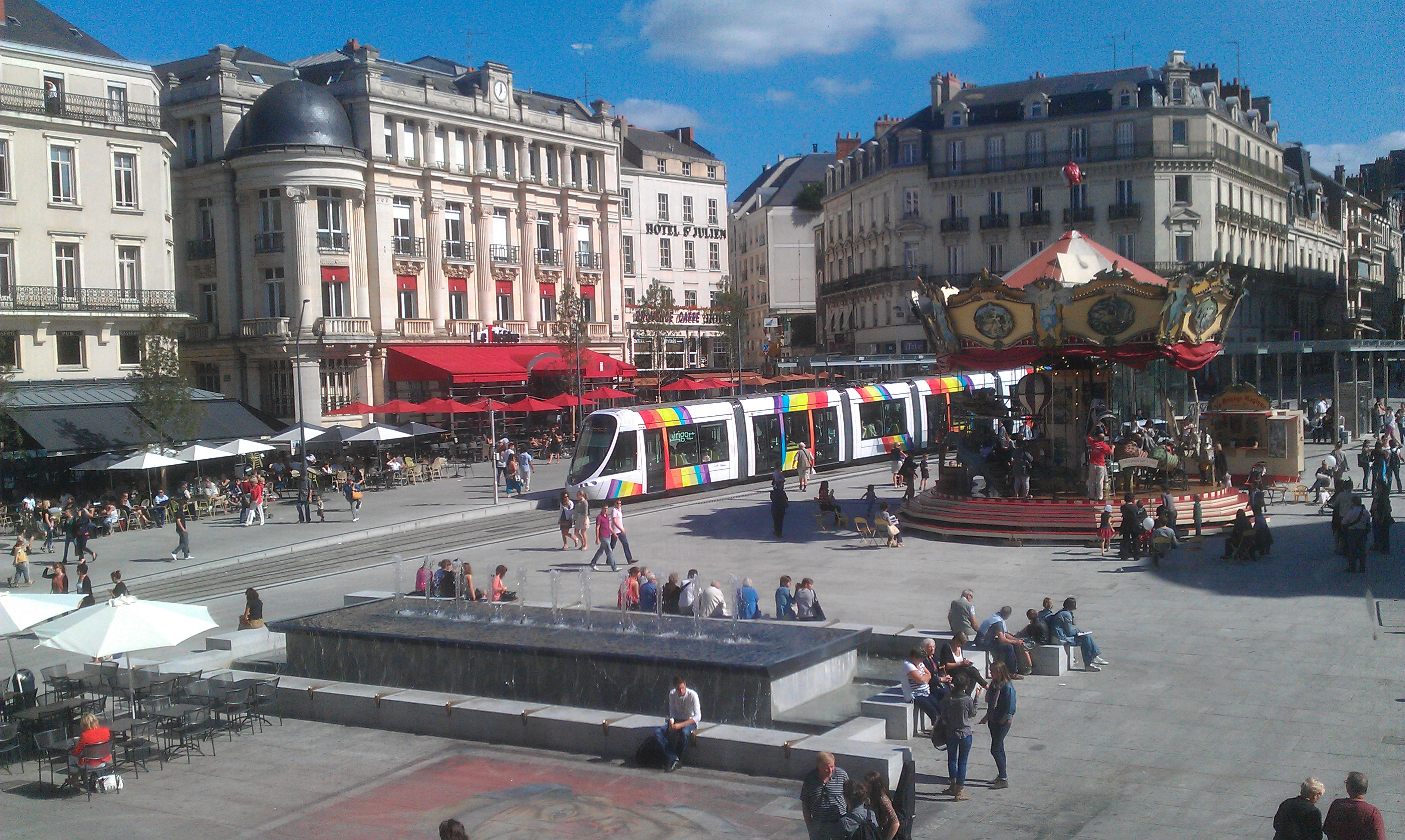 Tramway d'Angers place du Ralliement